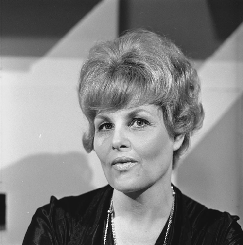 Christel Adelaar, VARA, 1975. Archief Beeld en Geluid. Catalogusnummer FTA001000932, fotonummer 2 (oud archiefnummer 75511). Opname 19 juni 1975, uitzending 17 juli 1975